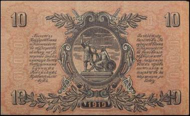 Деникинки 10 рублей 1919 реверс.jpg